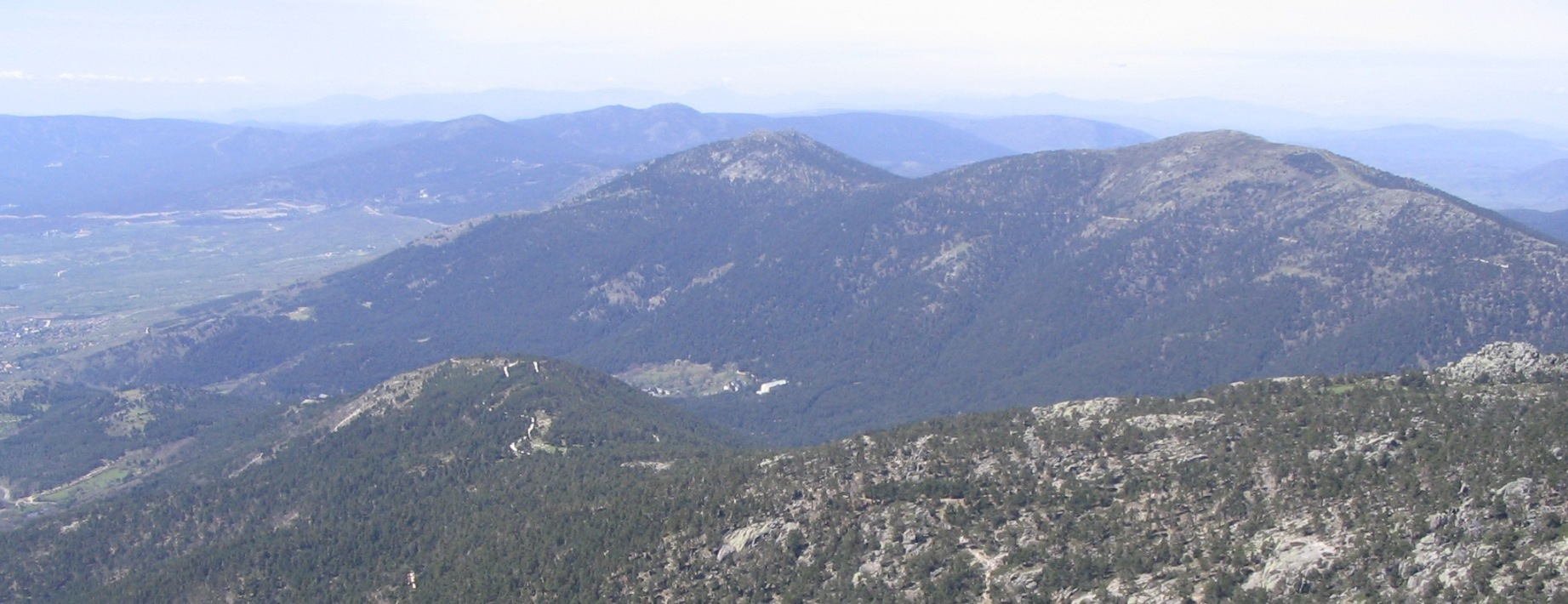 Fuenfría valley (Madrid), Spain